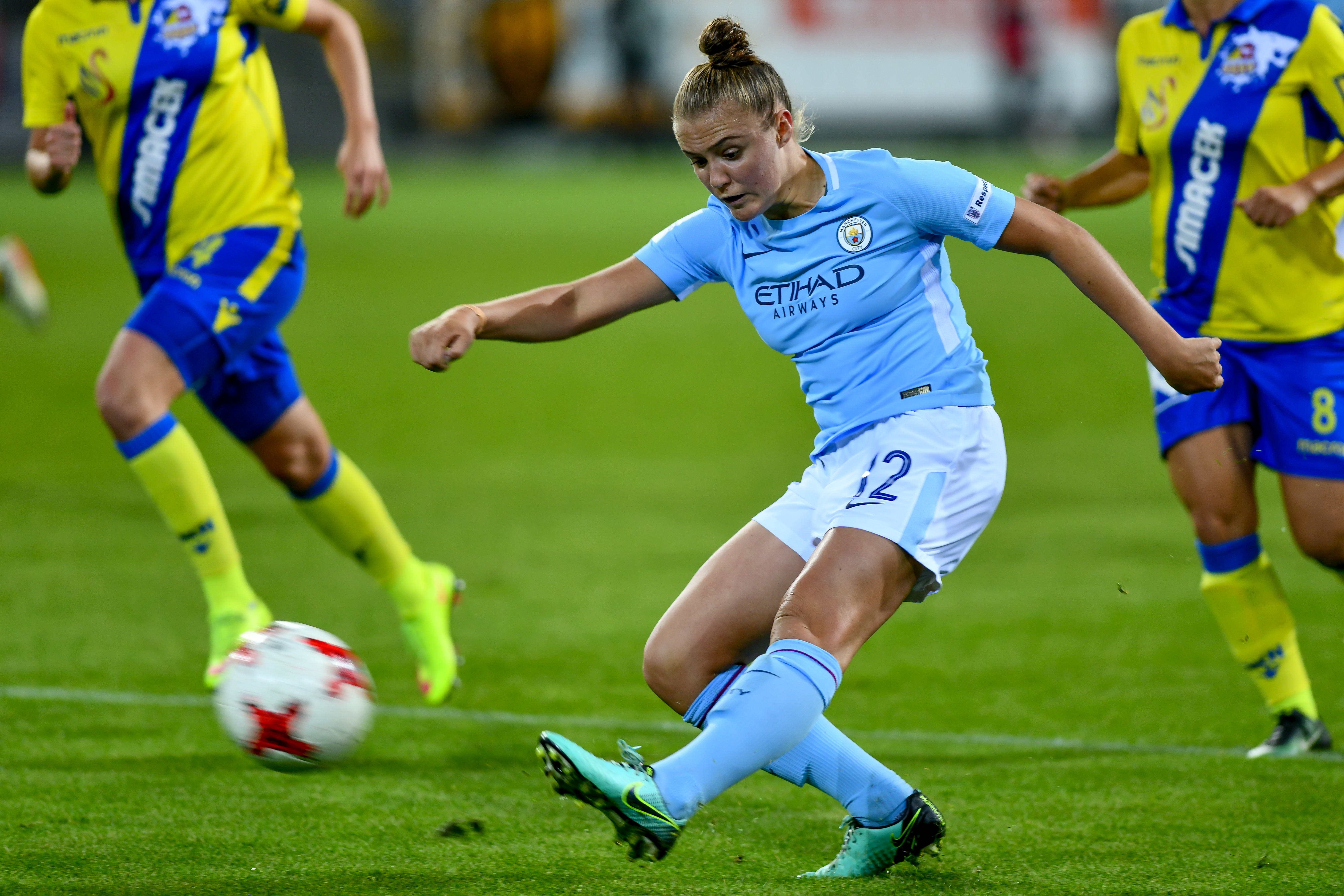 UEFA Women's Champions League 2017/18, Runde der letzten 32, SKN St. Pölten gegen Manchester City W.F.C. am 4.10.2017, Bild zeigt: Georgia Stanway (12, MCW)